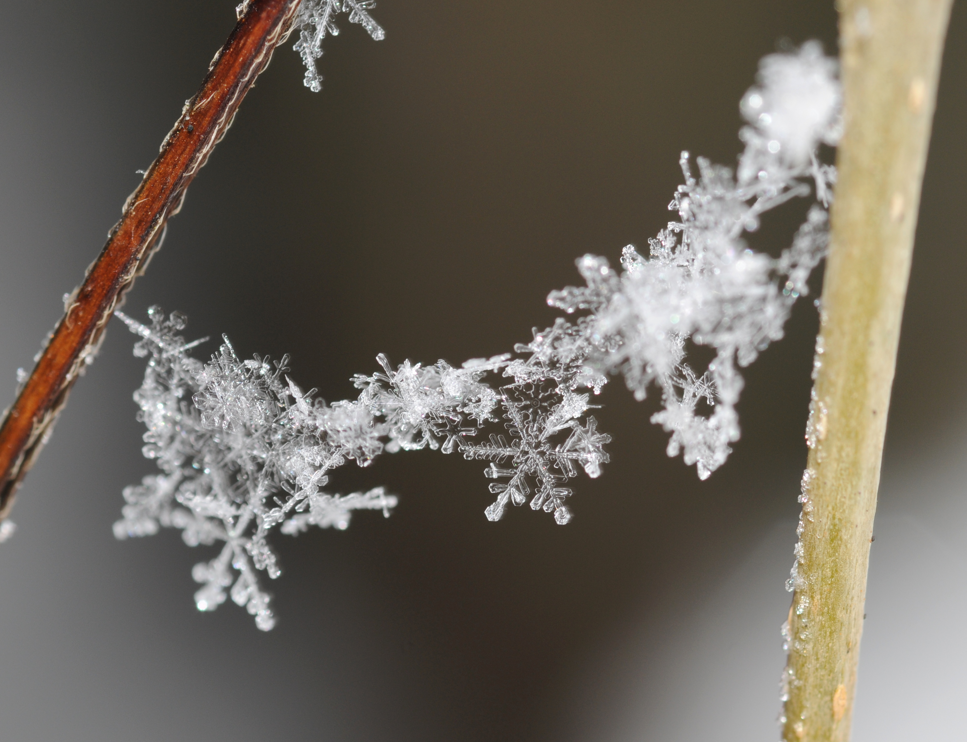 Cristaux de neige.